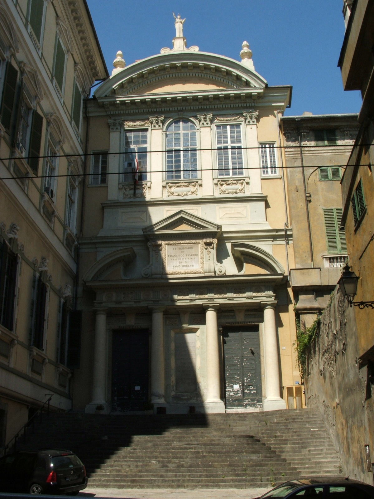 Immagine dalla città di Genova Via Balbi, sede universitaria